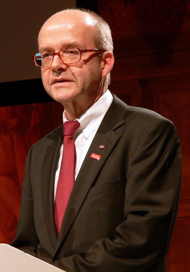 Rede von Ulrich Reimers zur Verleihung Niedersächsischer Staatspreis